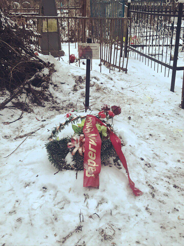 Գարեգին Նժդեհի գերեզմանը Վլադիմիրում, Ռուսաստան